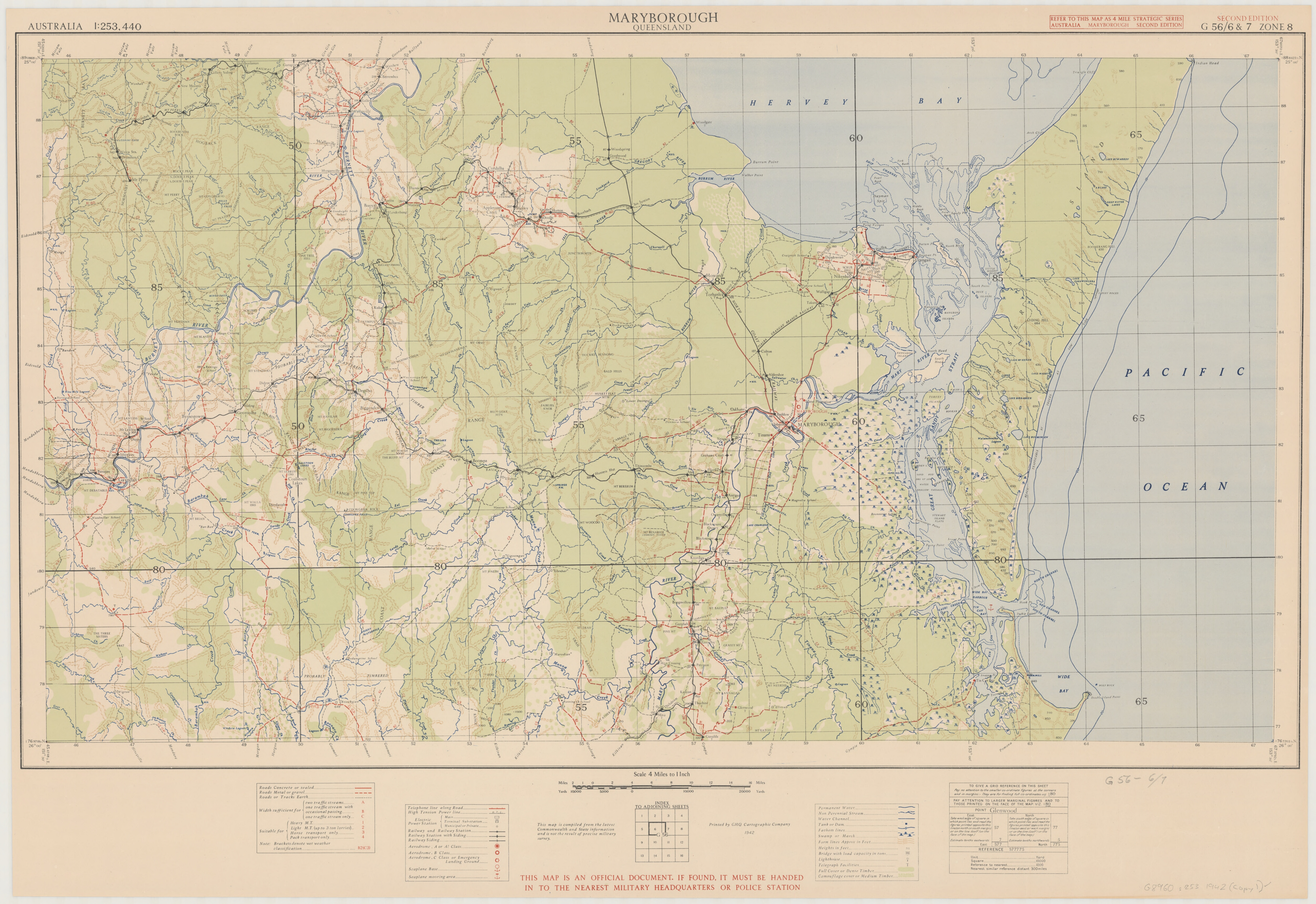 Topographic map sheet Maryborough, Queensland, scale 1:253,440, G 56/6 & 7 zone 8., E 151⁰30'--E 153⁰30'/S 25⁰00'--S 26⁰00', original size 47 x 82 cm., on sheet 58 x 84 cm.